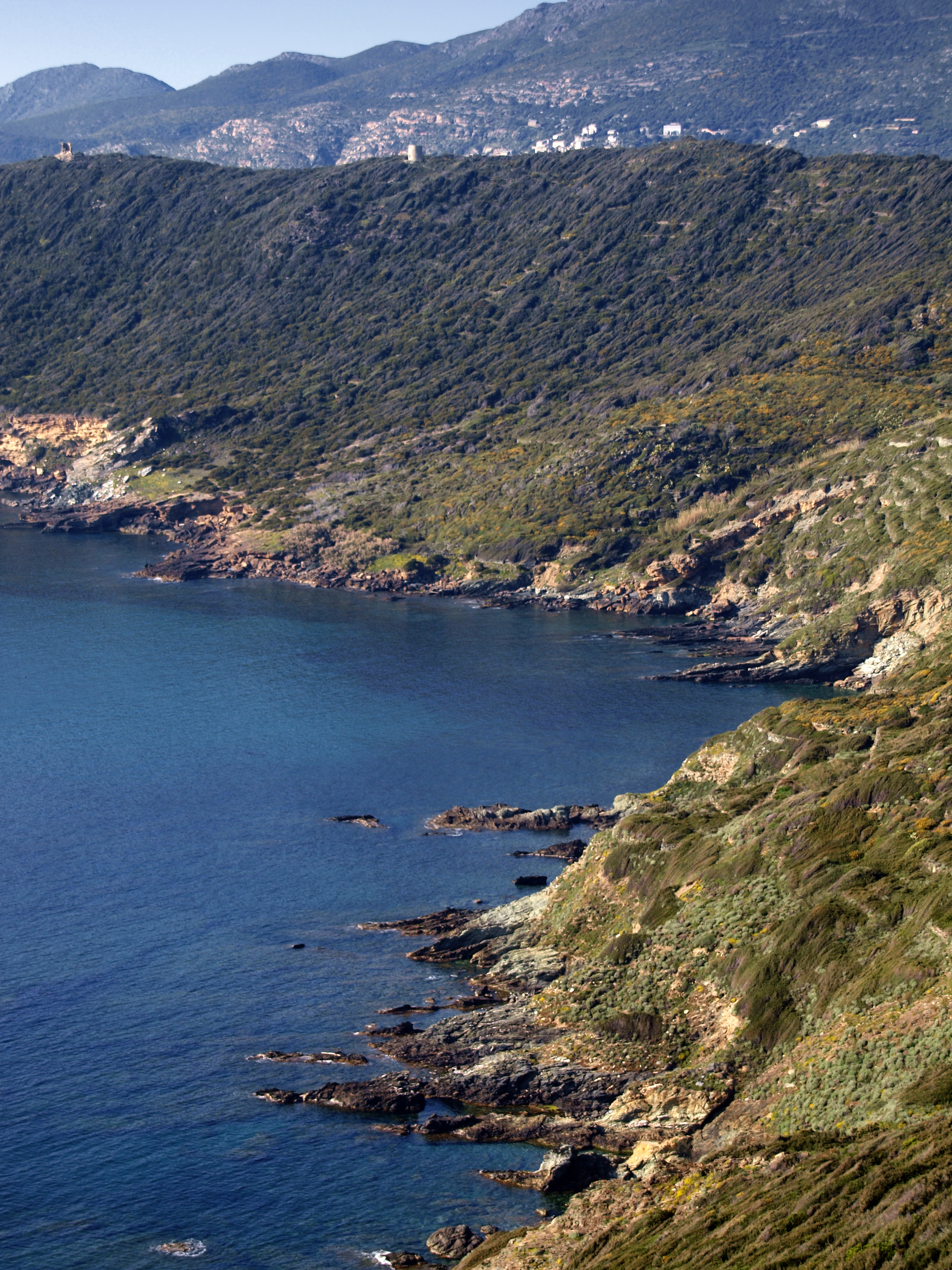 Morsiglia (Corsica) - Vue des anciens moulins